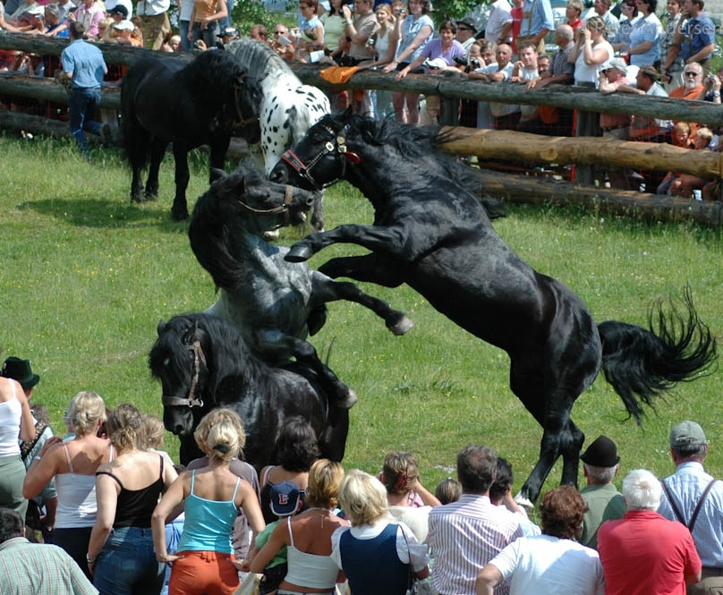 Hengstauftrieb Rauris: Die besten Noriker-Deckhengste werden gemeinsam auf der Grieswiesalm den Sommer verbriungen verbringen. Um Auseinandersetzungen auf der Alm zu vermeiden, wird bereits vorher der Leithengst ermittelt.